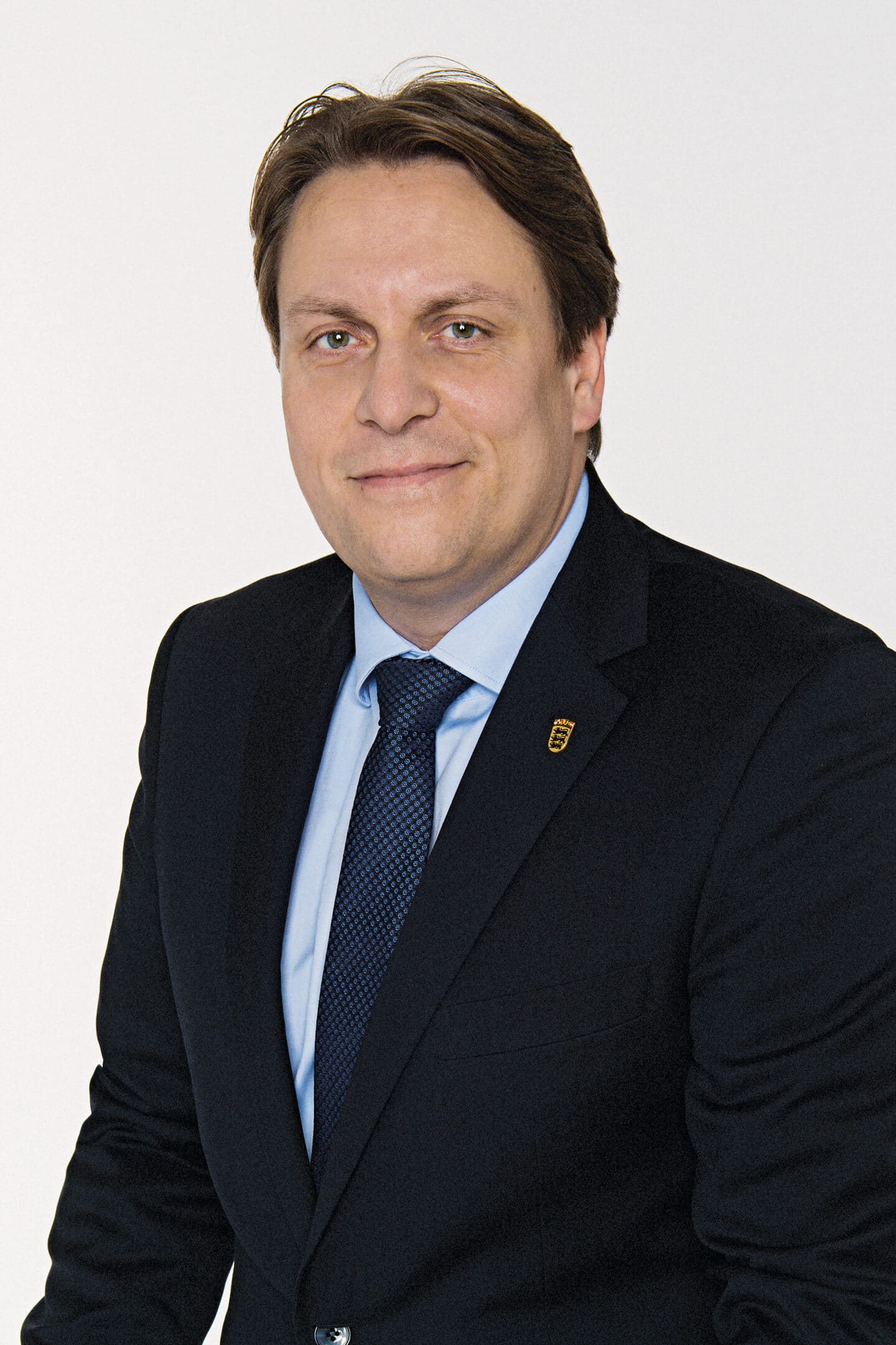 Boris Weirauch SPD Landtagsabgeordneter BW